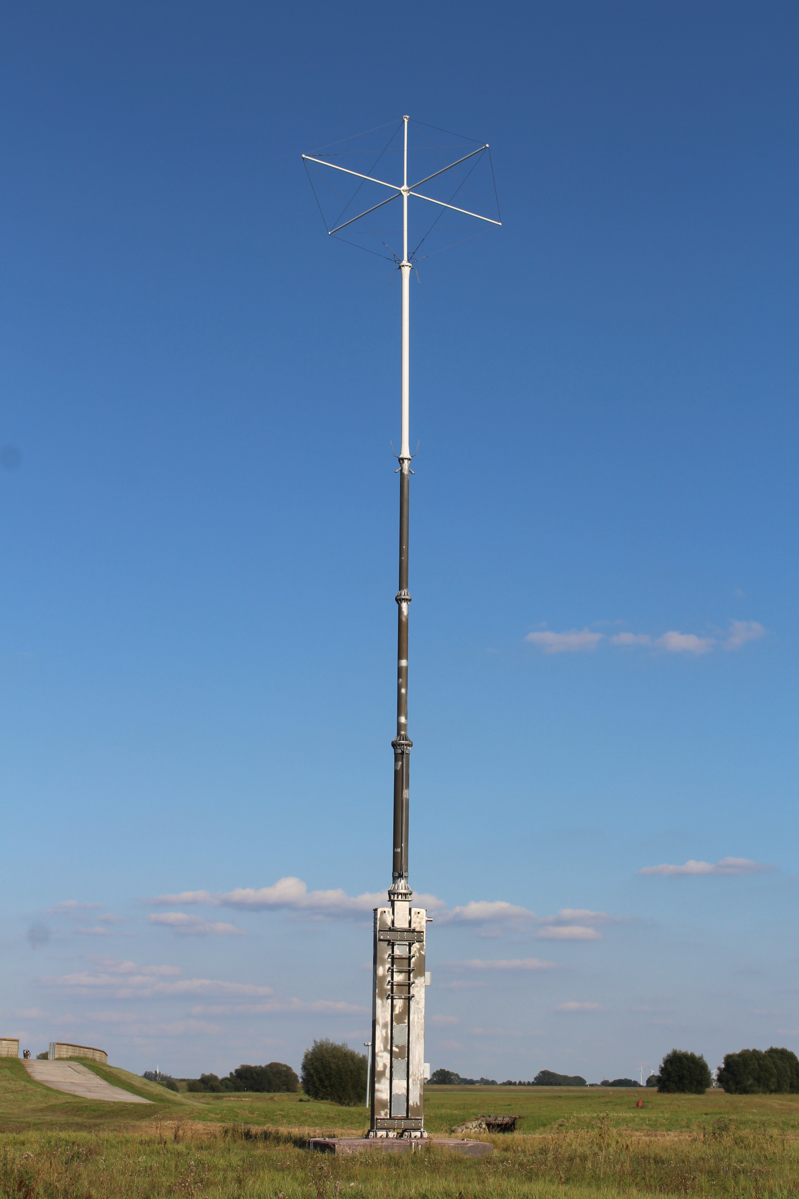 DGPS-Sendeturm Mauken